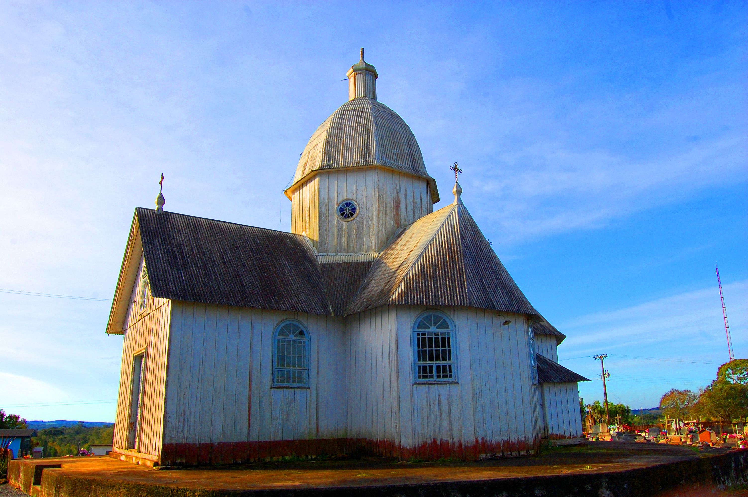 Igreja São Pedro e São Paulo em Moema, Itaiópolis, Santa Catarina.